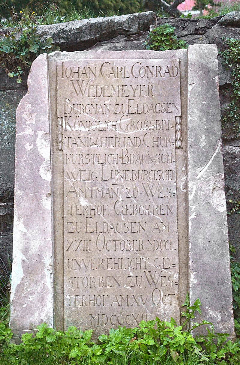 Bei Grabungsarbeiten auf dem Gebiet des ehemaligen Kirchhofes rund um die Kirche St. Alexandri in Eldagsen, heute das Gebiet des örtlichen Marktplatzes, wurde dieser Grabstein des Johann Carl Conrad Wedemeyer, einem Angehörigen der später geadelten Familie von Wedemeyer ,(wieder) aufgefunden. Die Inschrift lautet: „Johan Carl Conrad Wedemeyer Burgman zu Eldagsen Königlich Grossbritanischer und Churfürstlich Braunschweig Lüneburgischer Amtmann zu Westerhof. Gebohren zu Eldagsen am XXIII October MDCCL unverehelicht gestorben zu Westerhof am XV Oct: MDCCCXII“ ...